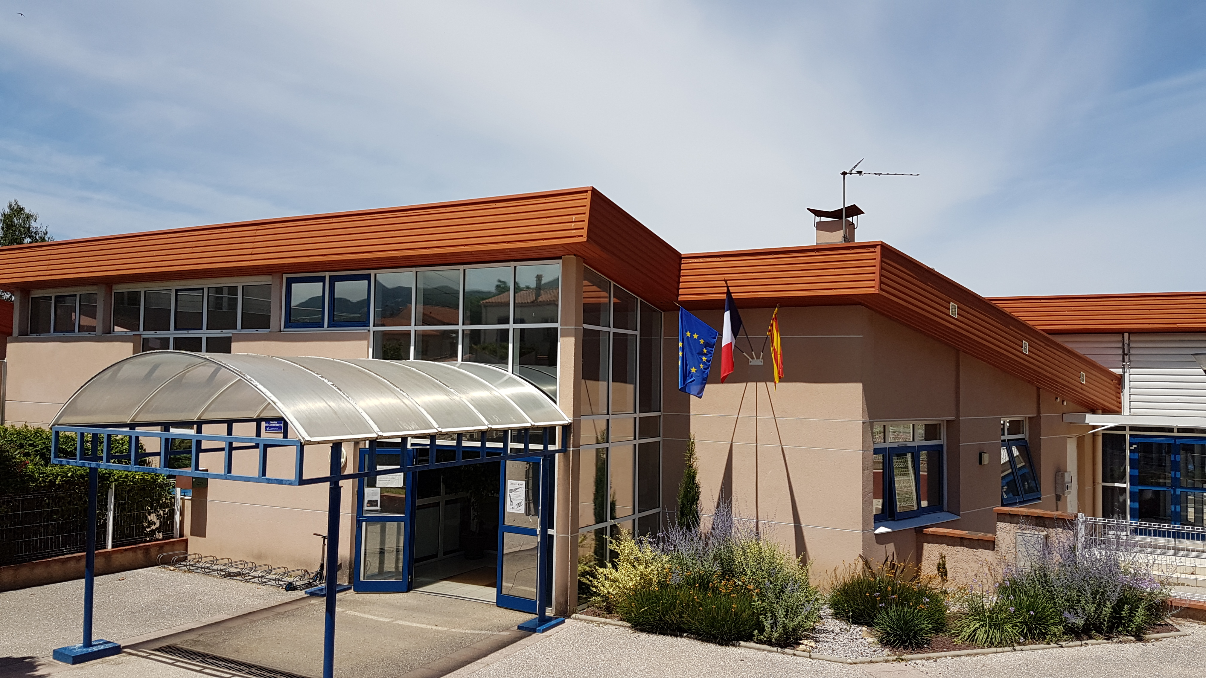 L'école maternelle de Maureillas